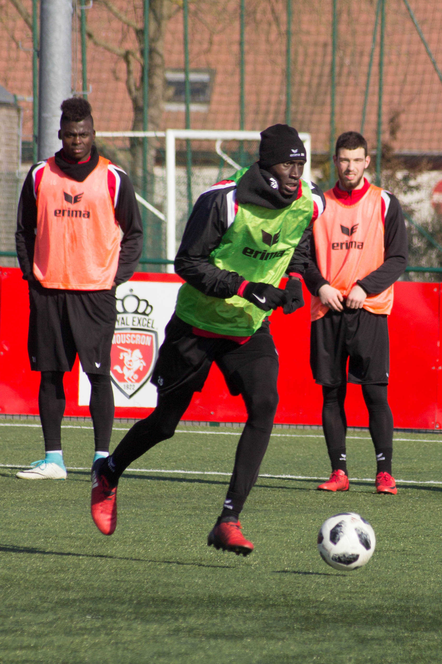 Entrainement du Royal Excel Mouscron, Futurosport, Mouscron. Le 22 Février 2018.